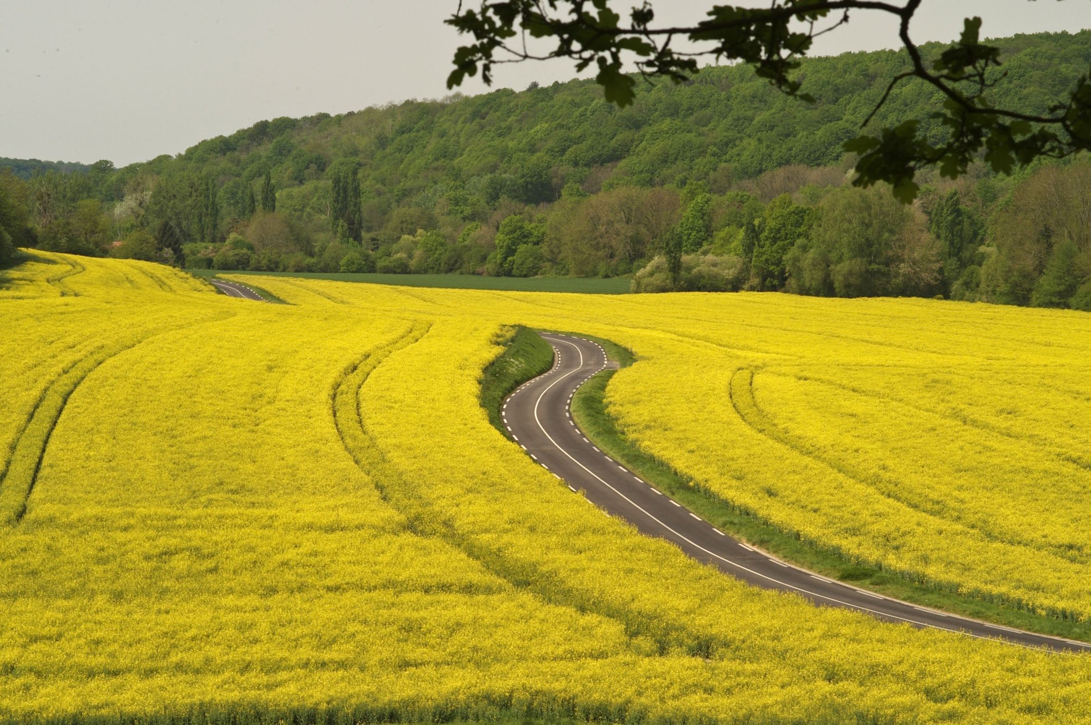 INRA, Jean Weber